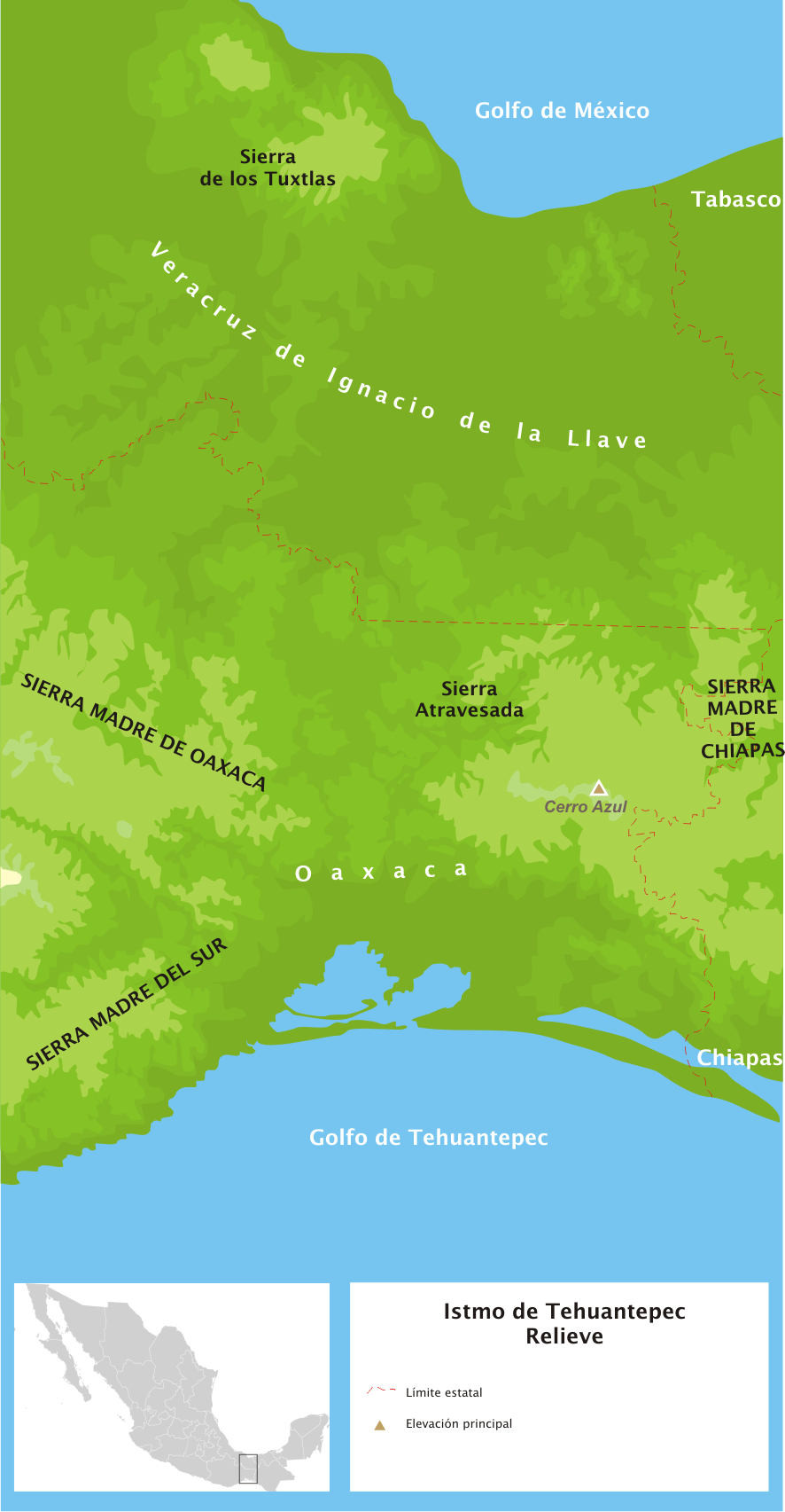 Mapa del relieve del istmo de Ttehuantepec, en el sureste de México